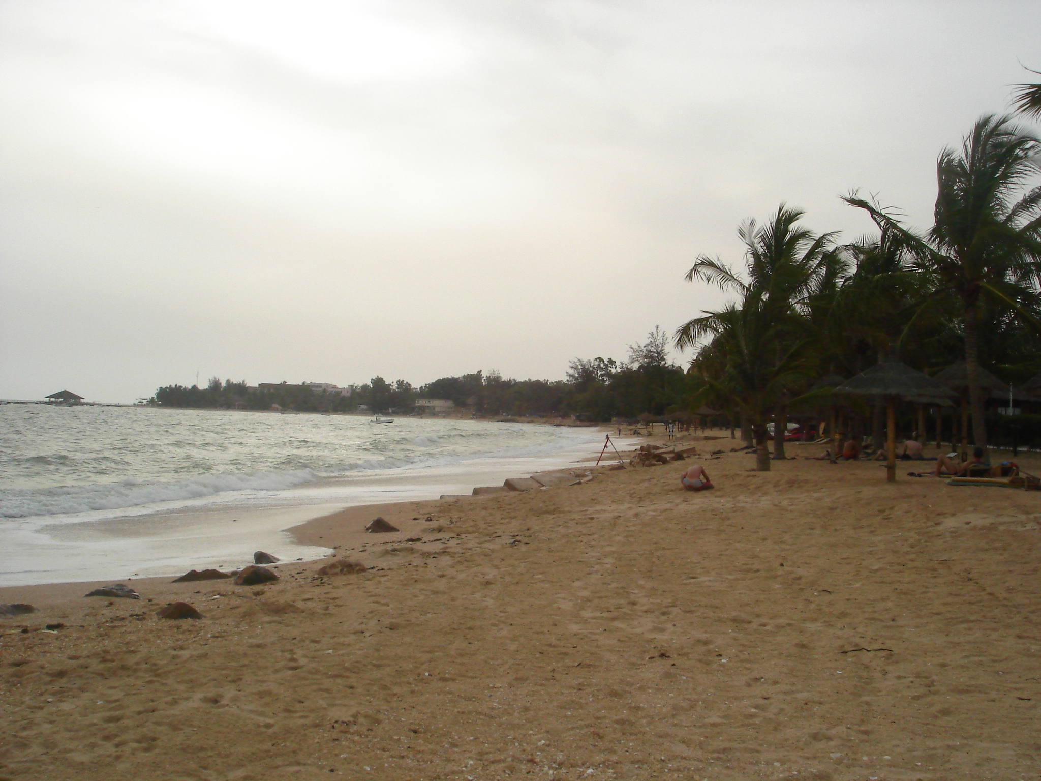 Vue sur la baie de Saly côté nord. Auteur : Jean-Claude Perez